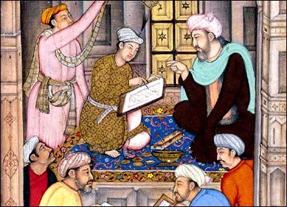 Page from Akhlaq-i Nasiri